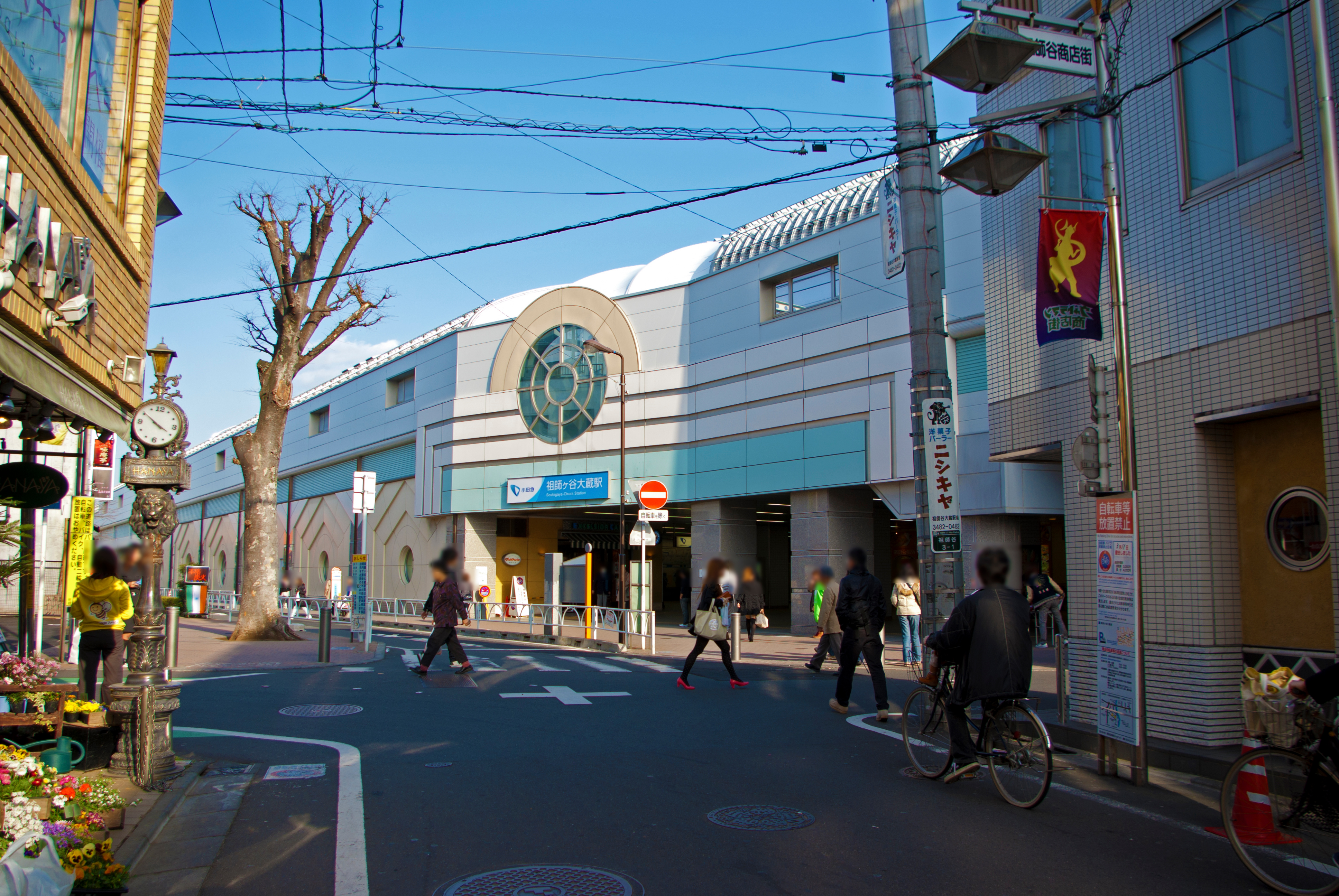 小田急電鉄小田原線祖師ヶ谷大蔵駅